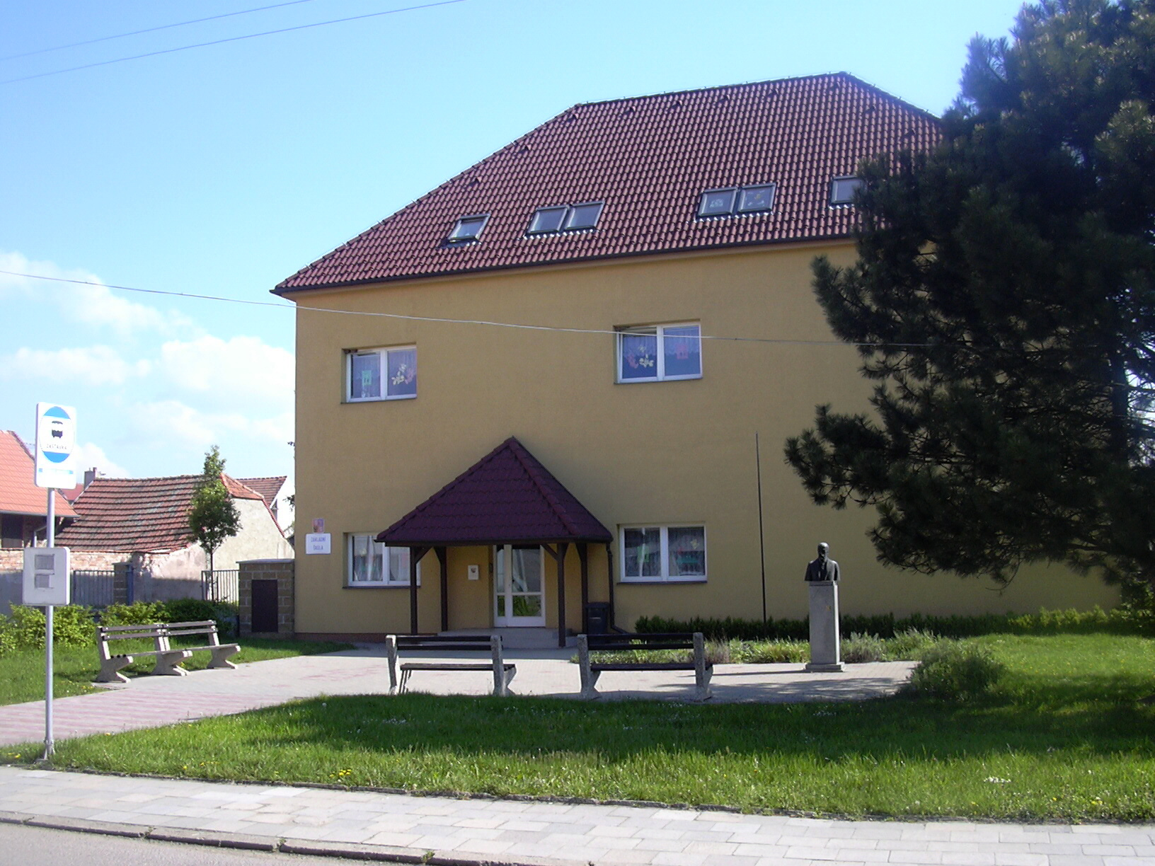 Obecní škola Komořany (Vyškov District - Czech Republic)